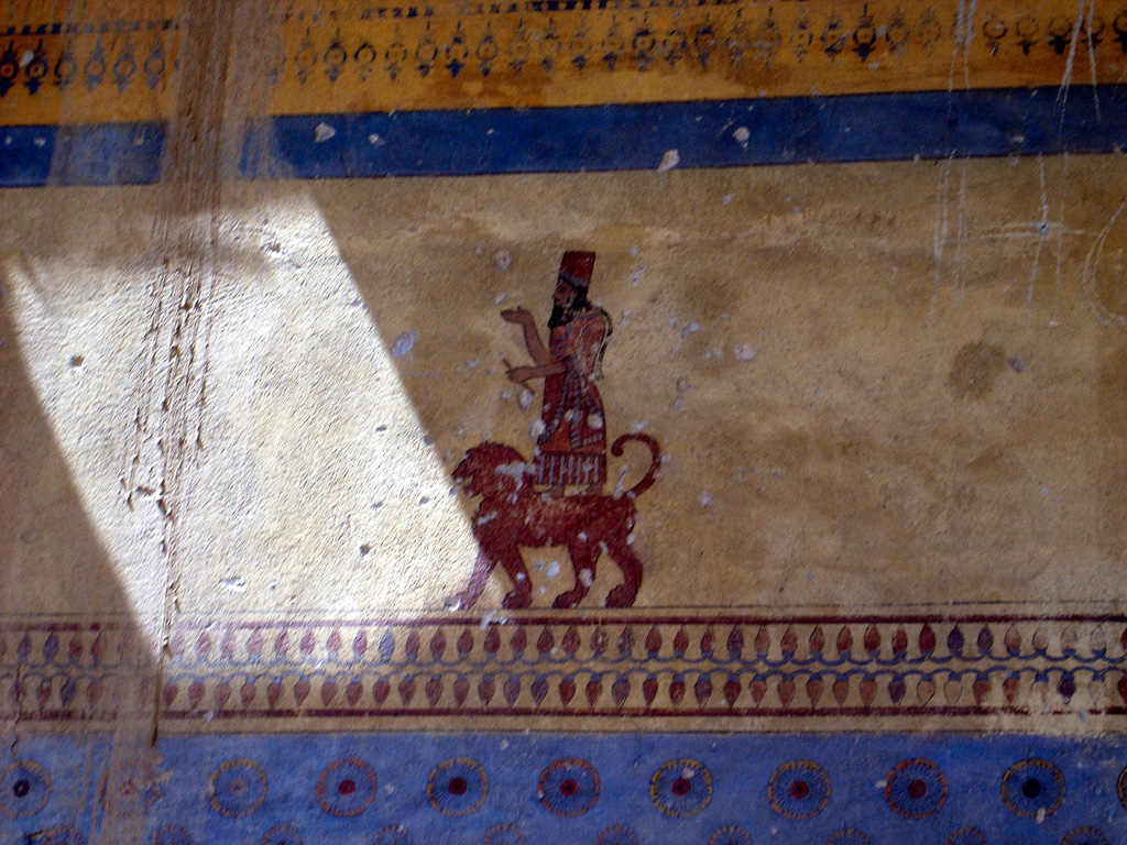 Erevan, la forteresse d'Erébouni